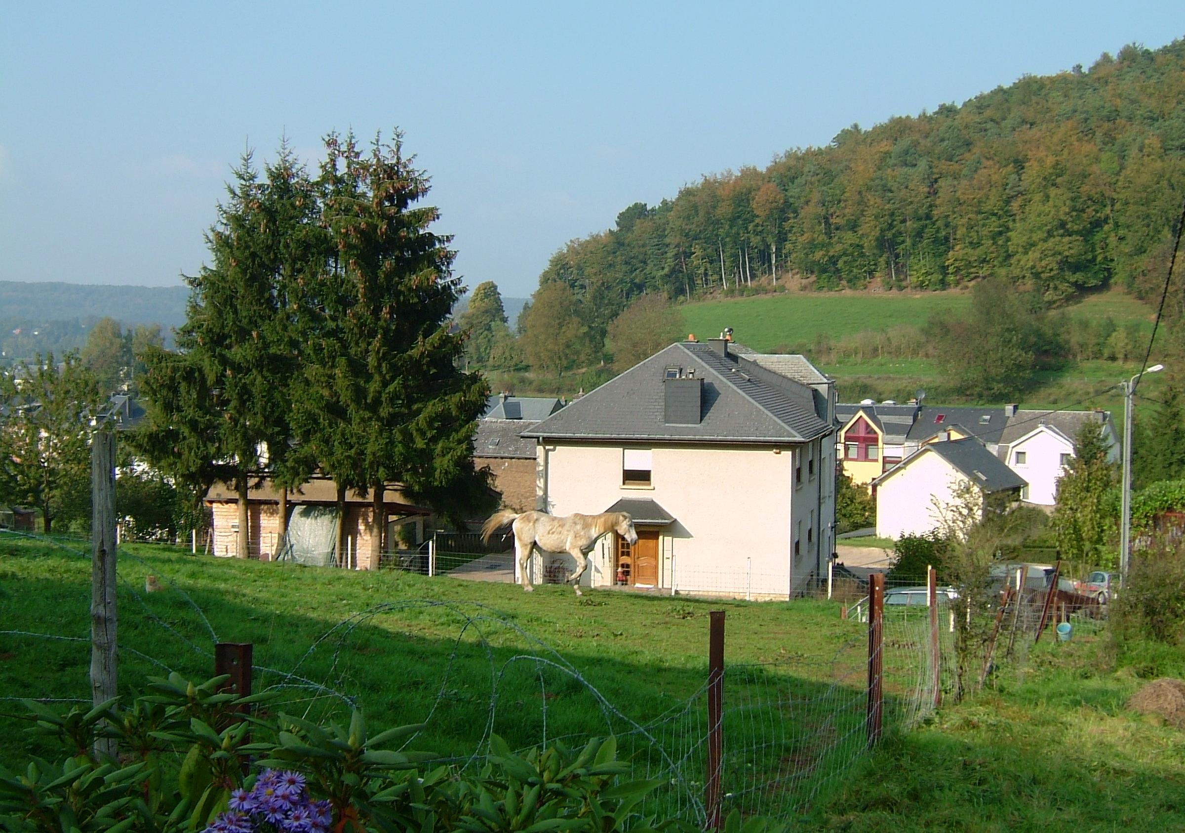 Herenterbierg zu Téiteng